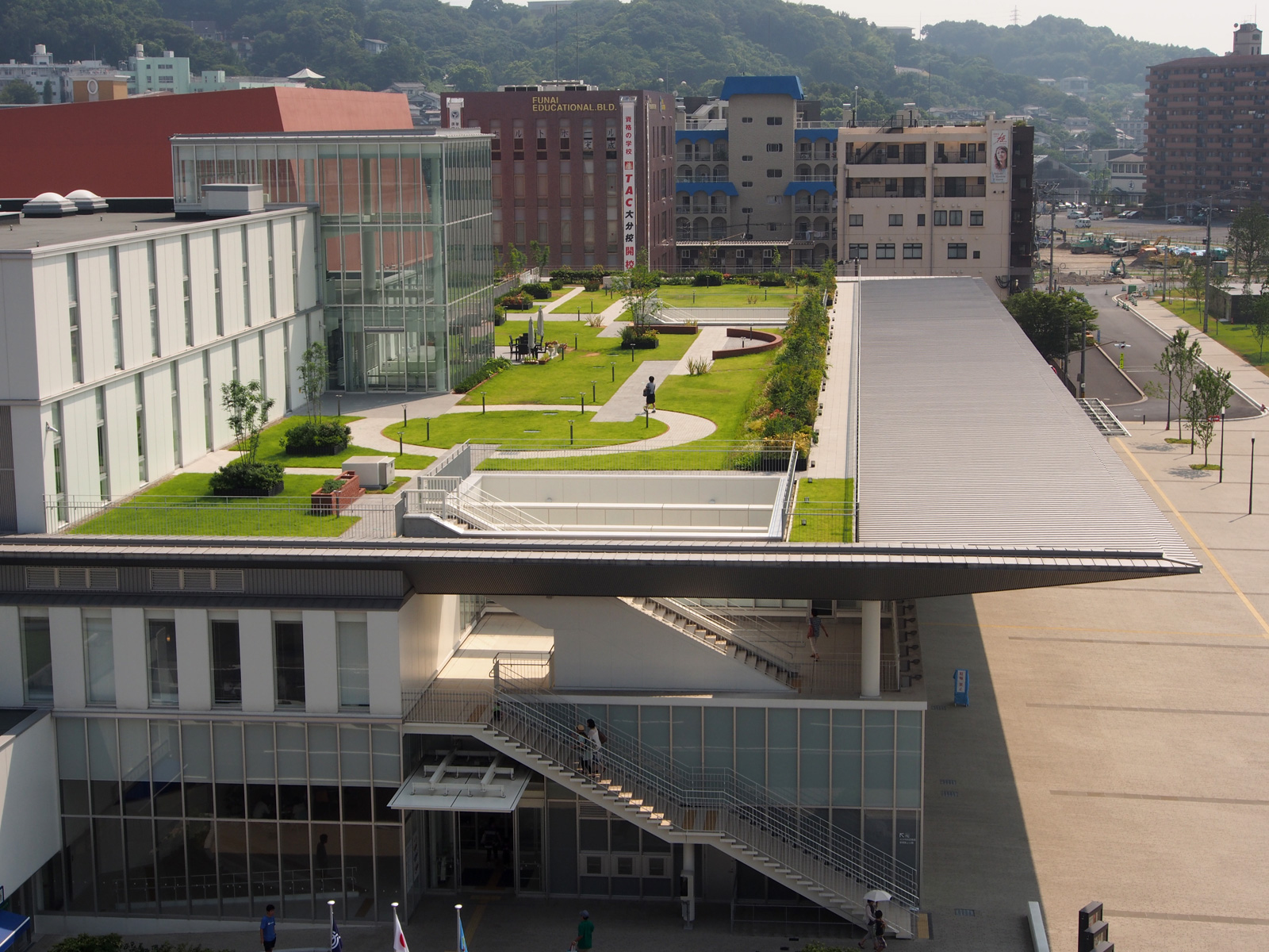 ホルトホール大分の屋上庭園（大分県大分市）